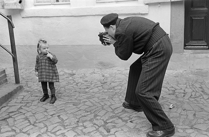 Original image description from the Deutsche Fotothek Roger Rössing beim Fotografieren eines kleinen Mädchens